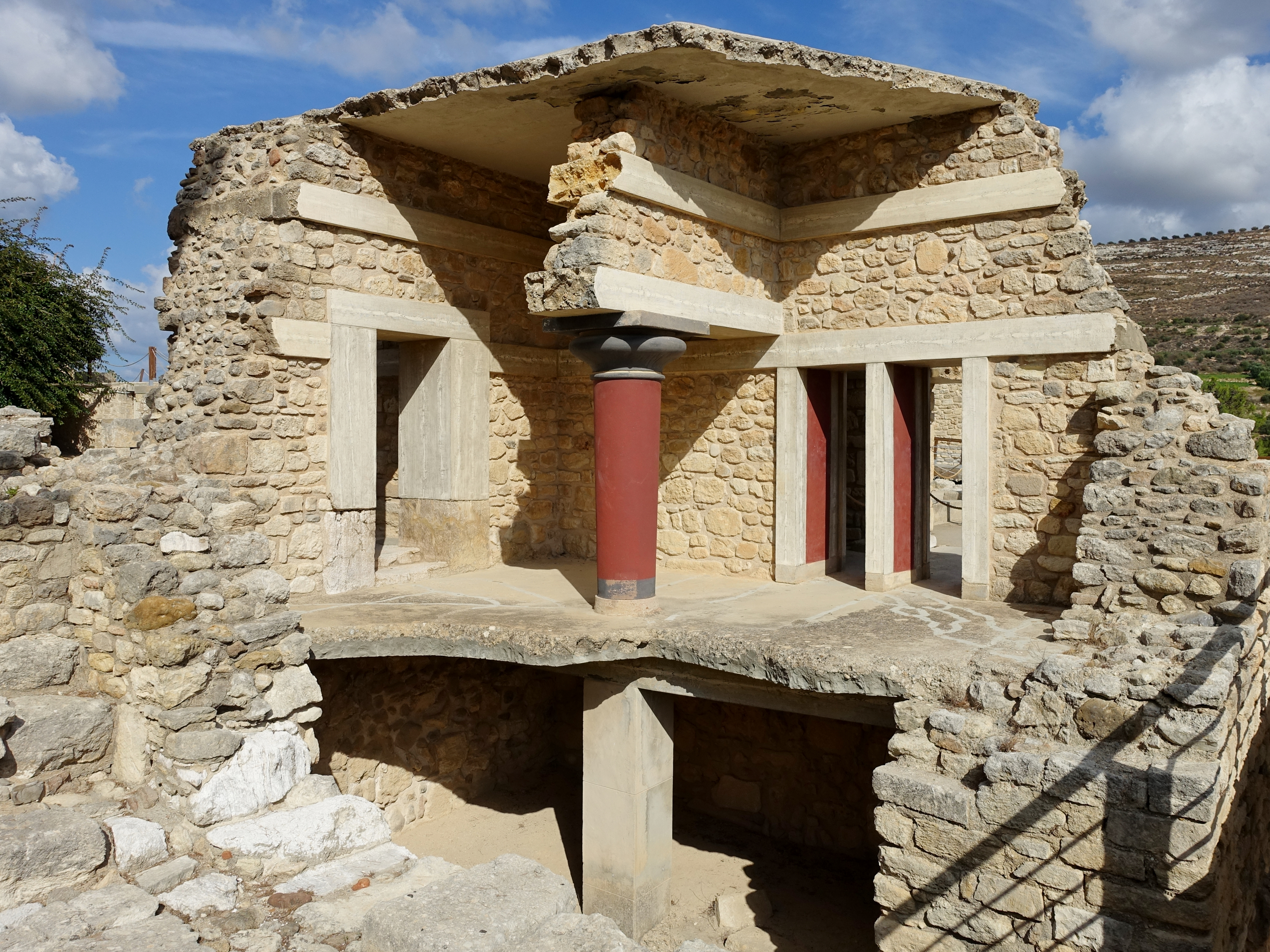 Südpropyläen von Knossos (Κνωσός), Kreta, Griechenland